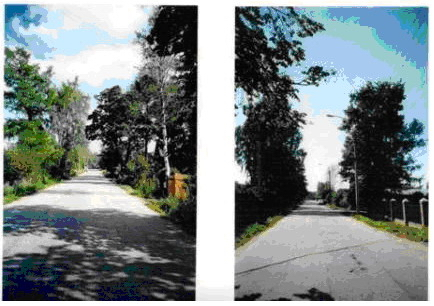 Новосельские улицы